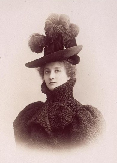 Jane Henriot par Reutlinger